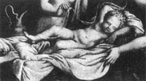 Giulio romano, giove, national gallery di londra, forse copia del cupido di michelangelo